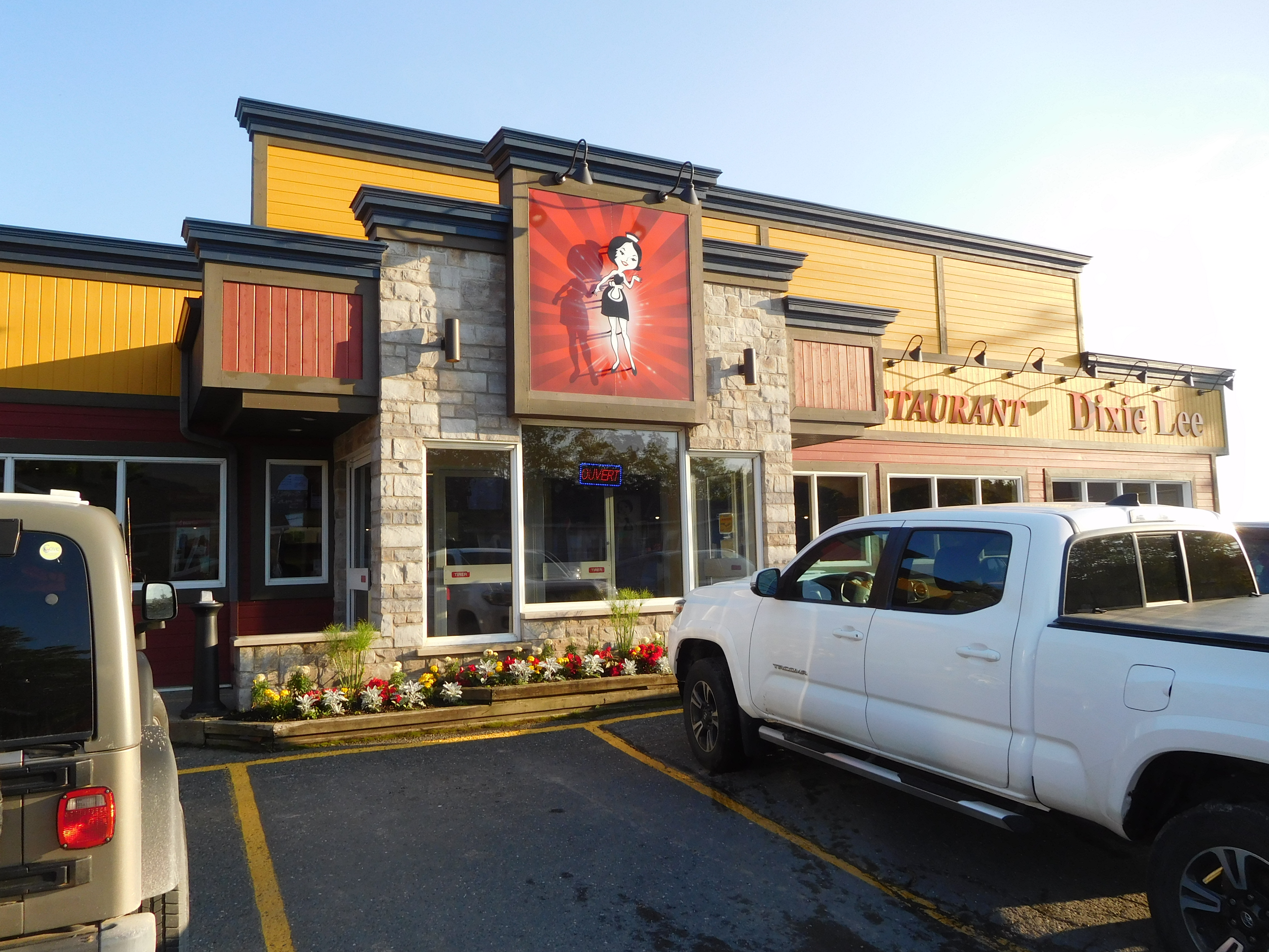 Restaurant Dixie Lee, 693, boulevard Perron, Carleton-sur-Mer